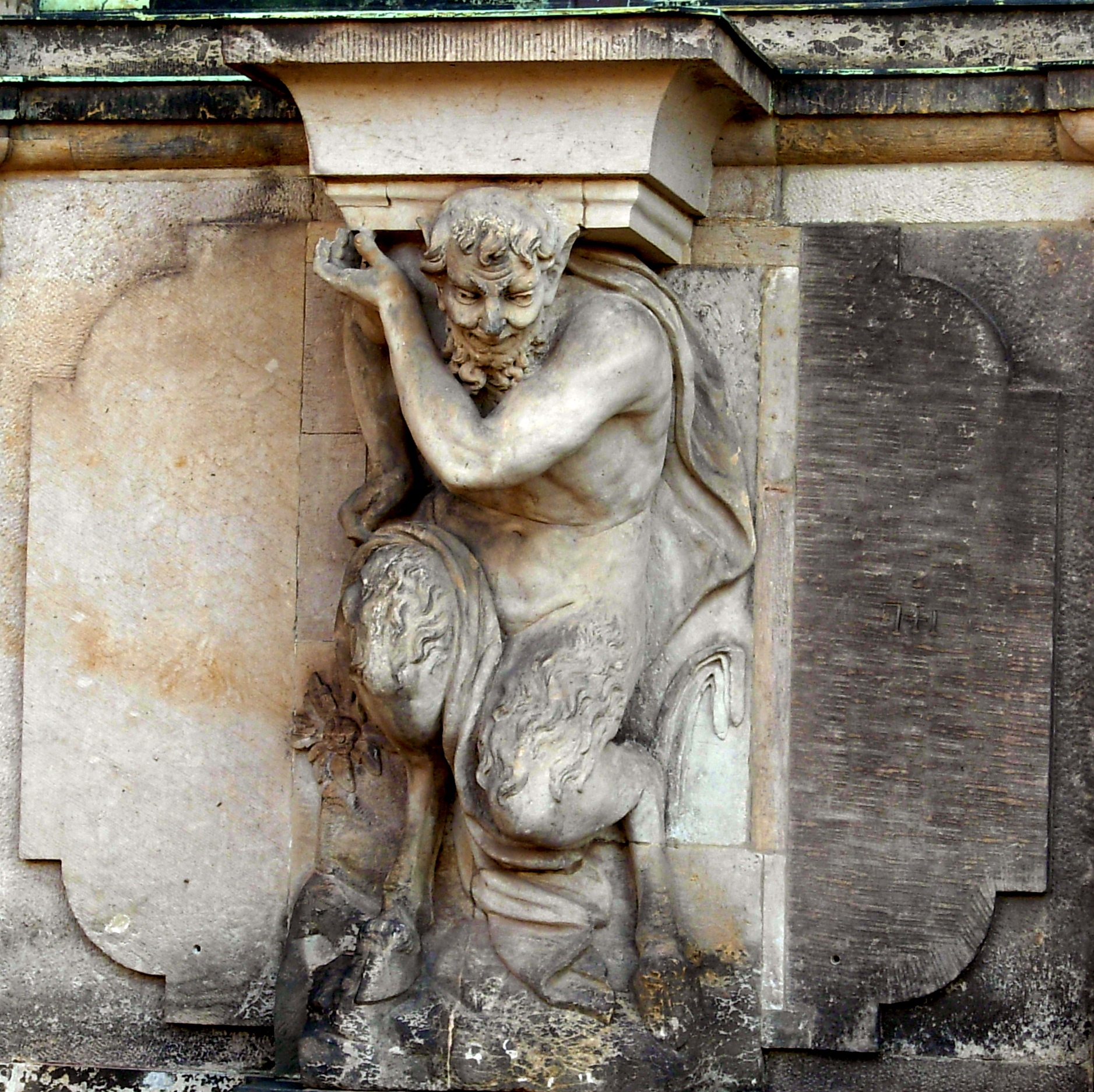 Satyr. Zwinger Palace, Dresden. Satyras. Cvingerio rūmai, Drezdenas